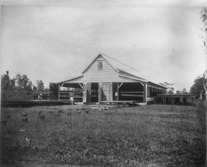 Foto. Cacaoloods op de onderneming 't Vertrouwen' in Suriname.